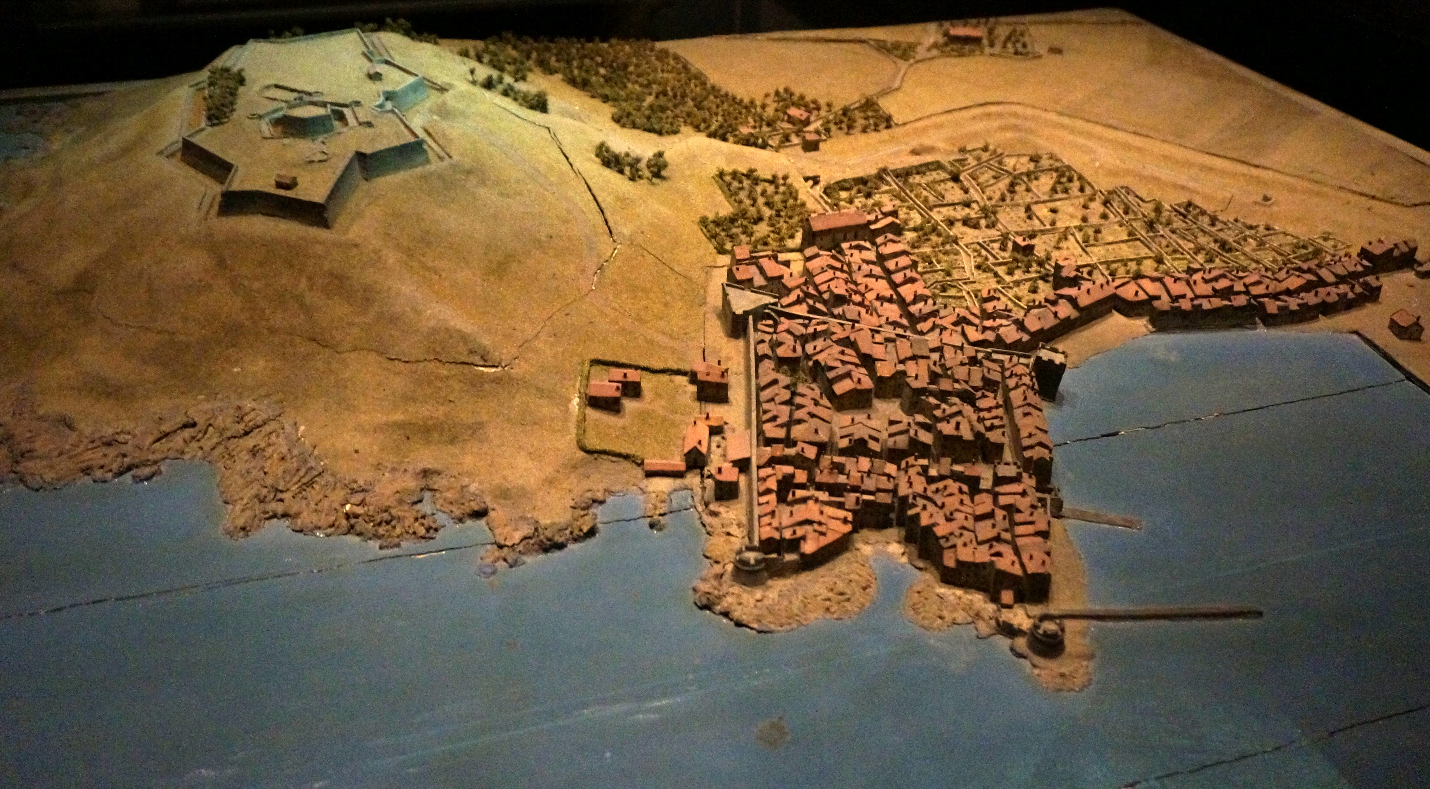 Au musée des plans et maquettes, maquette du XVII ou XVIII.